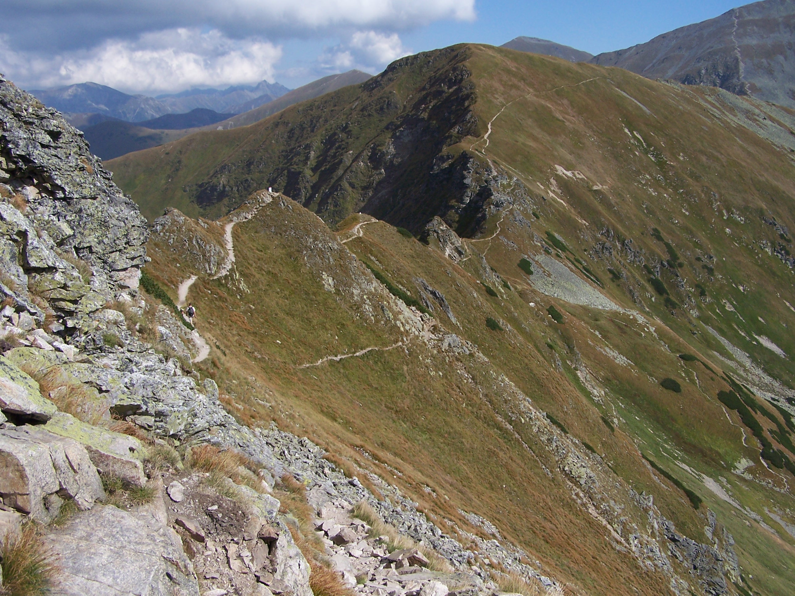 Dziurawa Przełęcz. Widok ze zboczy Wołowca. Powyżej przełęczy Łopata i Jarząbczy Wierch